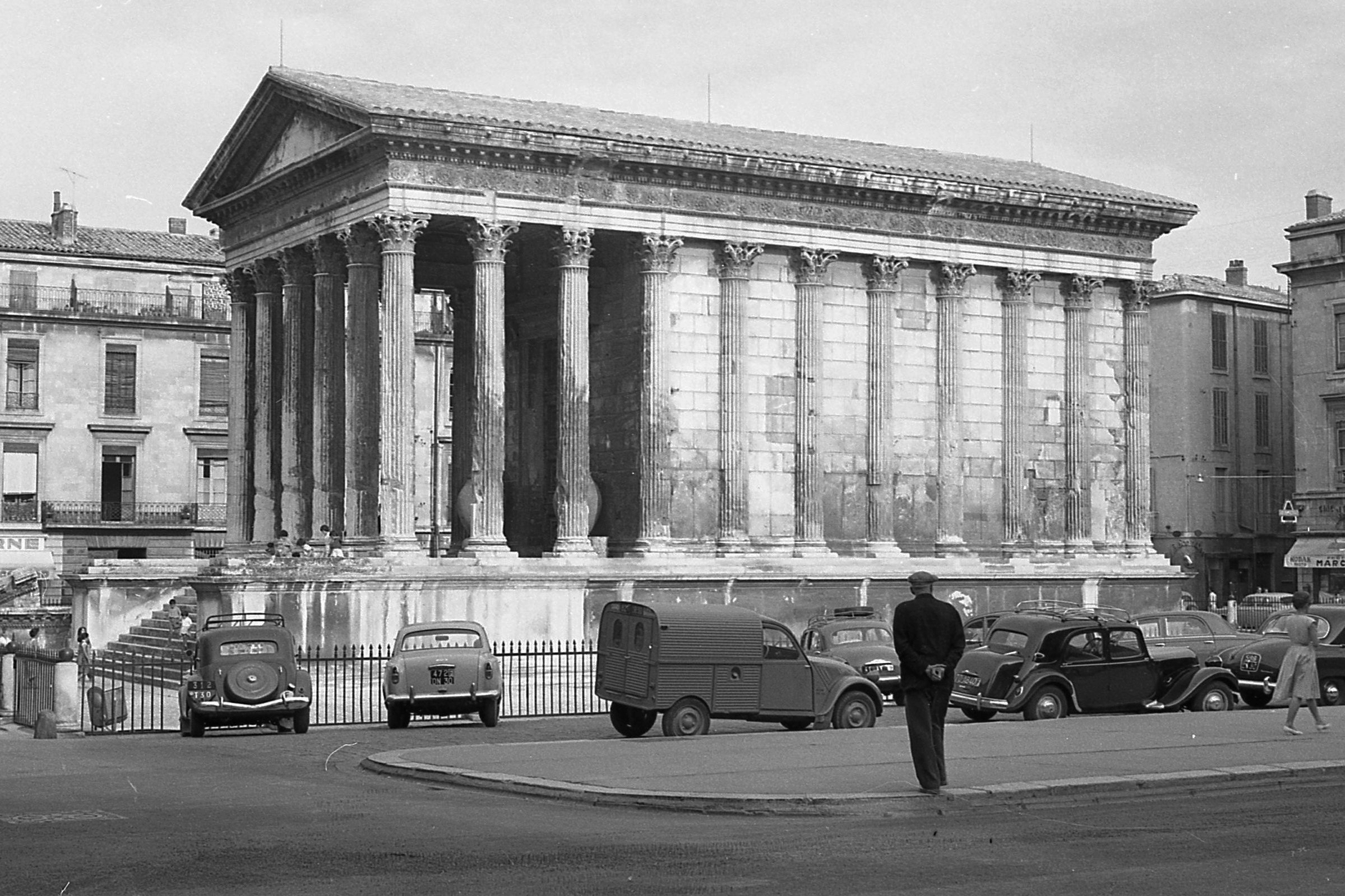 Maison Carrée (ókori római templom). Location: France Tags: Roman Empire, ancient culture, Corinthian columns, pillar, Citroën-brand, automobile Title: Maison Carrée (ókori római templom).